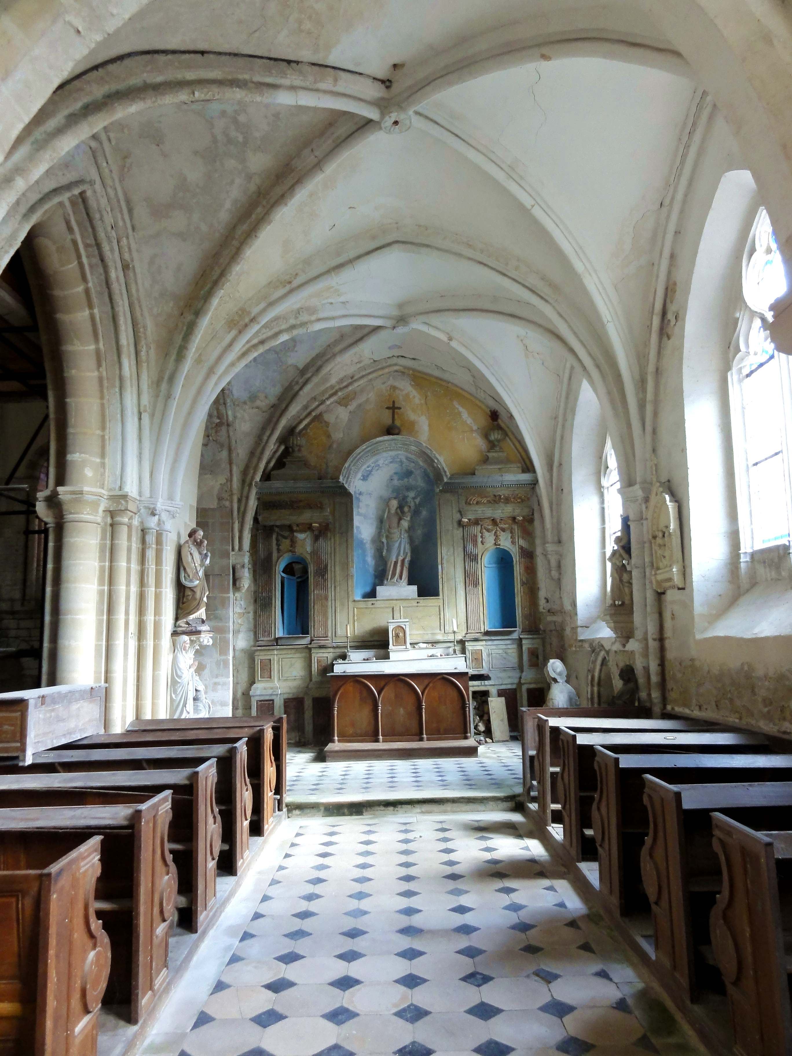 Intérieur de l'église - voir le titre du fichier.